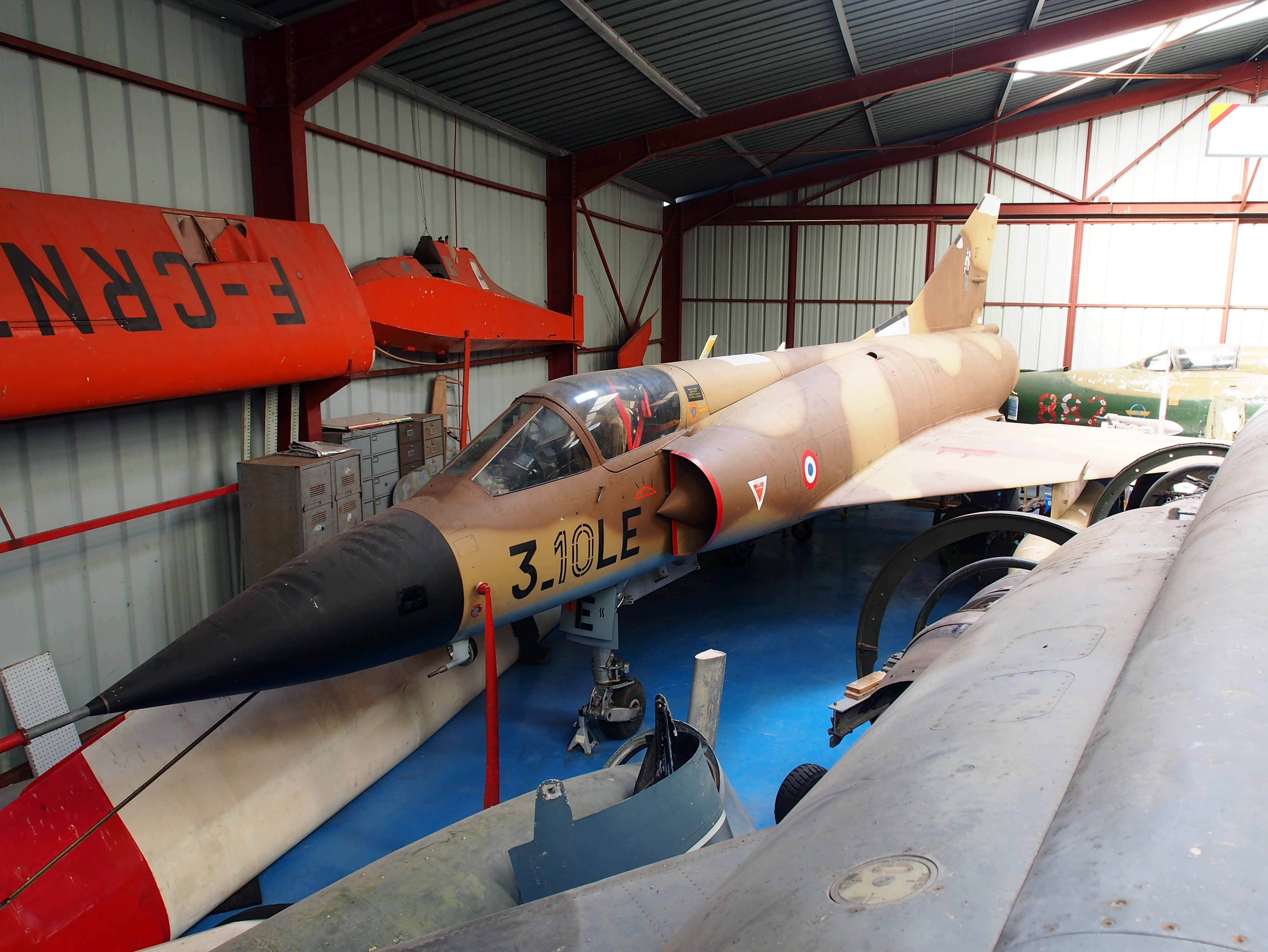 Photographed at the Musée de l'Epopée de l'Industrie et de l'Aéronautique, Albert, France.